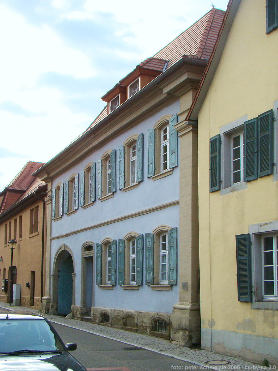 Ehemalige Judenschule in Kraichtal-Gochsheim